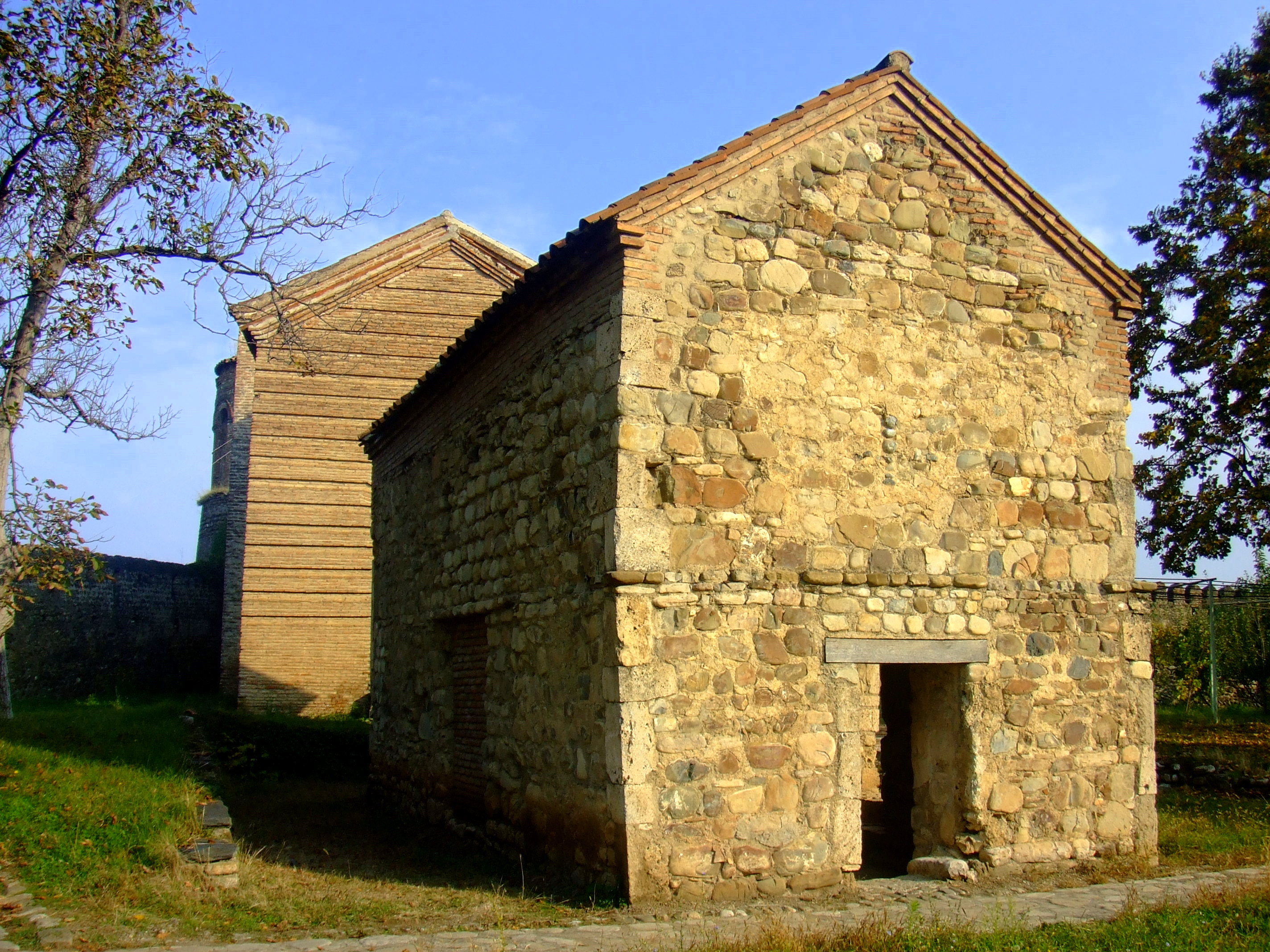 Telavi